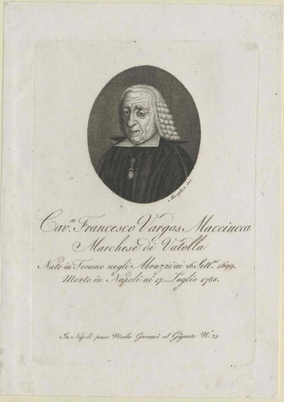 Documento raffigurante Francesco Vargas Macciucca